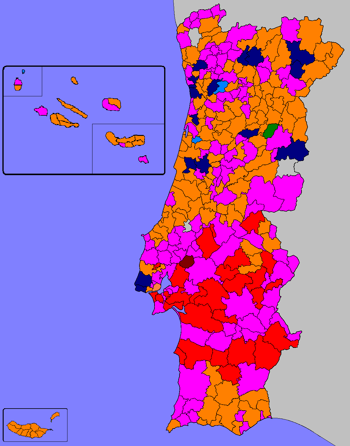 Mapa ilustrativo do partido mais votado por Concelho (Câmara Municipal)